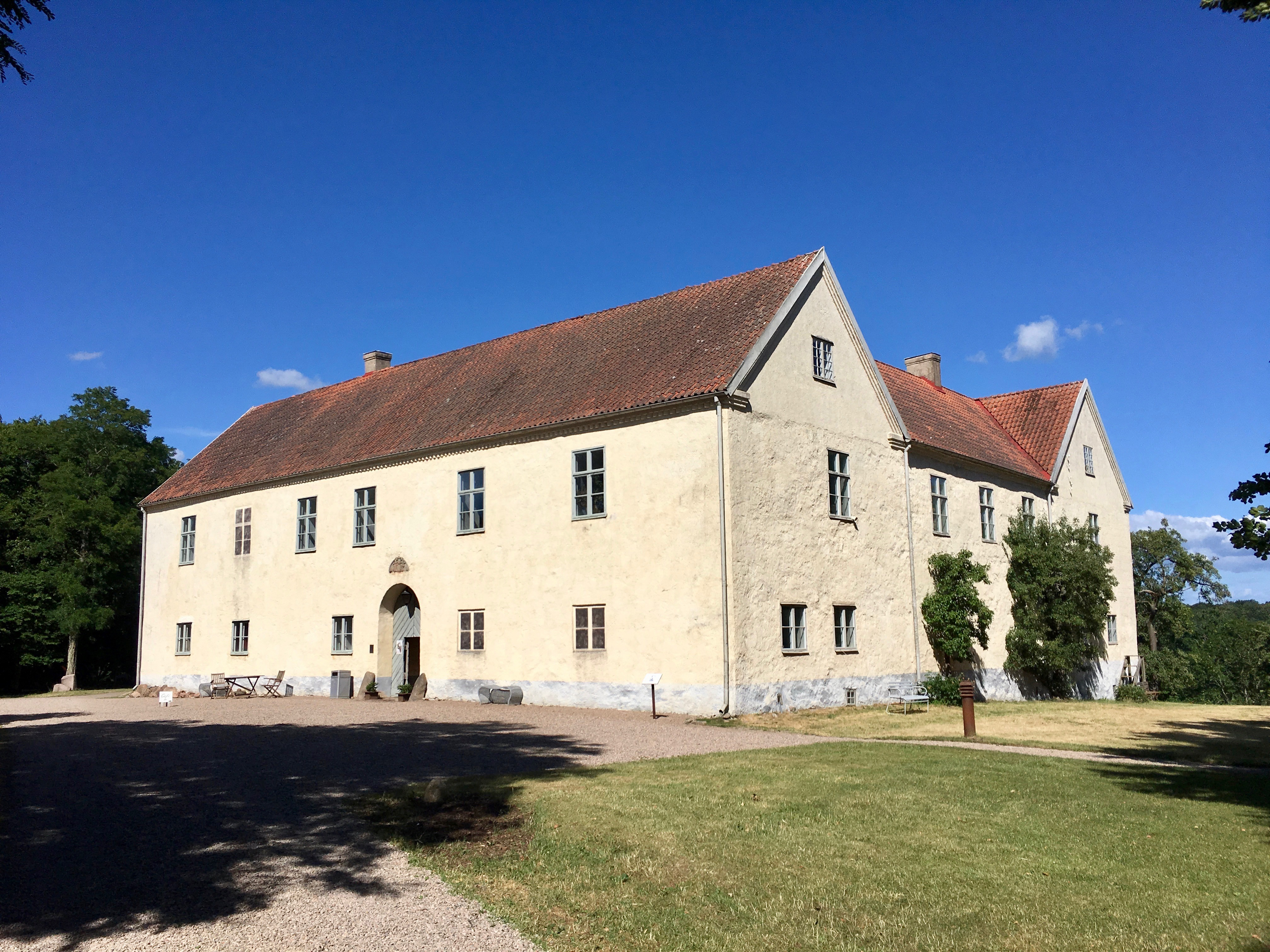 Tomarps Kungsgård, Skåne, Sverige